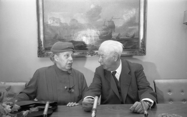 Pressekonferenz - Deutsches Müttergenesungswerk im Haus des Bundespräsidenten